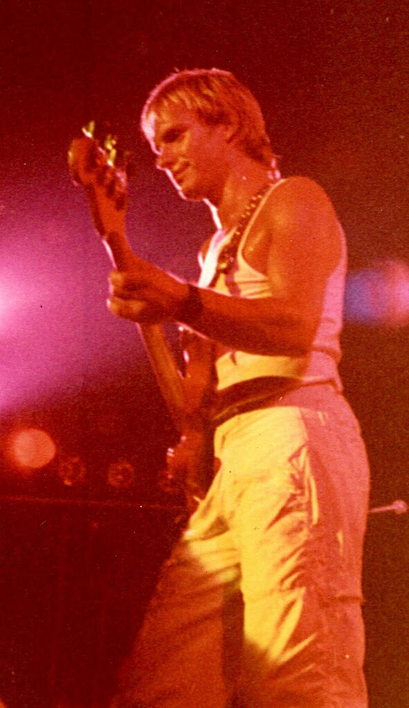 Sting, The Police. Buenos Aires, Argentina. Estadio Obras Sanitarias. 15 de diciembre de 1980